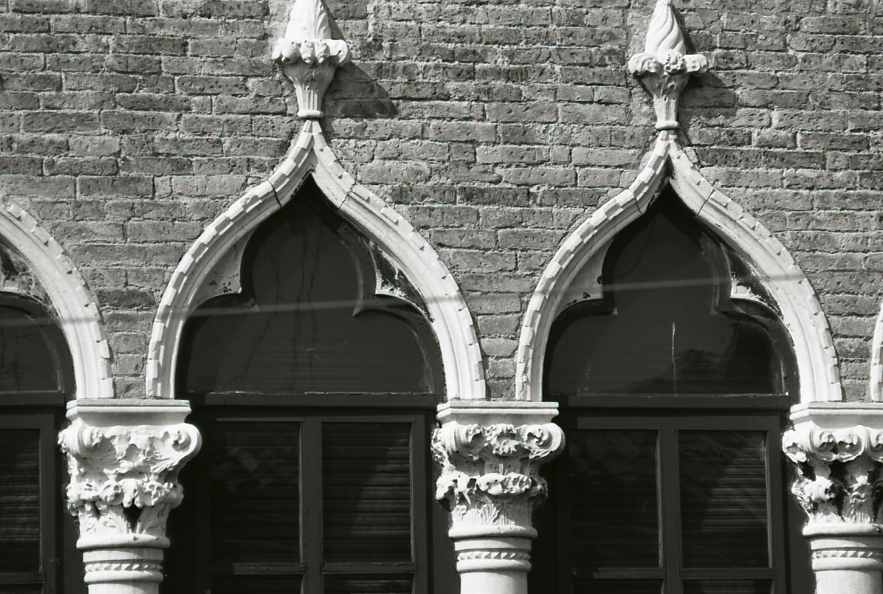 Servizio fotografico : Venezia, 1969 / Paolo Monti. - Strisce: 7, Fotogrammi complessivi: 37 : Negativo b/n, gelatina bromuro d'argento/ pellicola ; 35 mm. - ((I fotogrammi hanno una doppia numerazione. . - Sul portanegativi: Nikon Pan F. - Sul dorso del portanegativi Monti specifica: "Finestre". - Probabilmente questa specifica in penna biro rossa si riferisce a ricerche personali che esulano dal contesto del servizio commissionato da Electa. - I soggetti sono elencati all'interno del portanegativi. - Occasione: Pubblicazione: "Edoardo ARSLAN, Venezia gotica: architettura civile gotica veneziana, Milano, Electa, 1970"